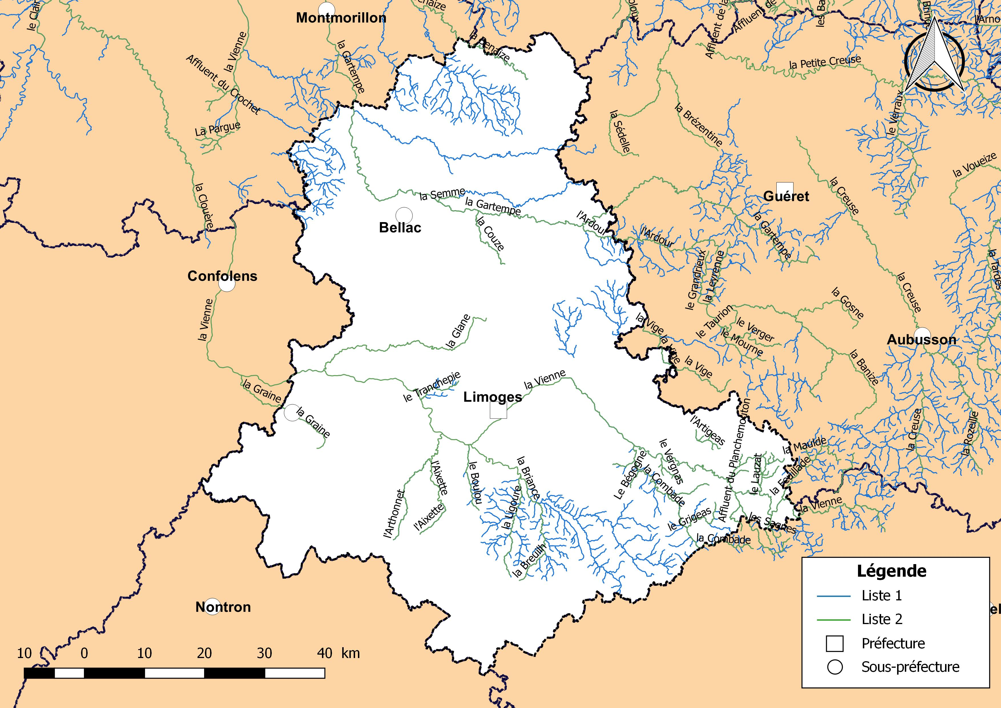 Classement des cours d'eau du département de la Haute-Vienne (France) au titre de la continuité écologique (article L214.17 I du Code de l'environnement).